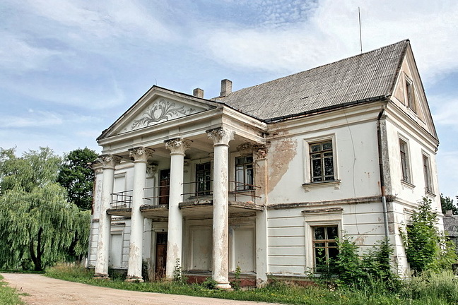 Veprių dvaro rūmai (XIX a.)